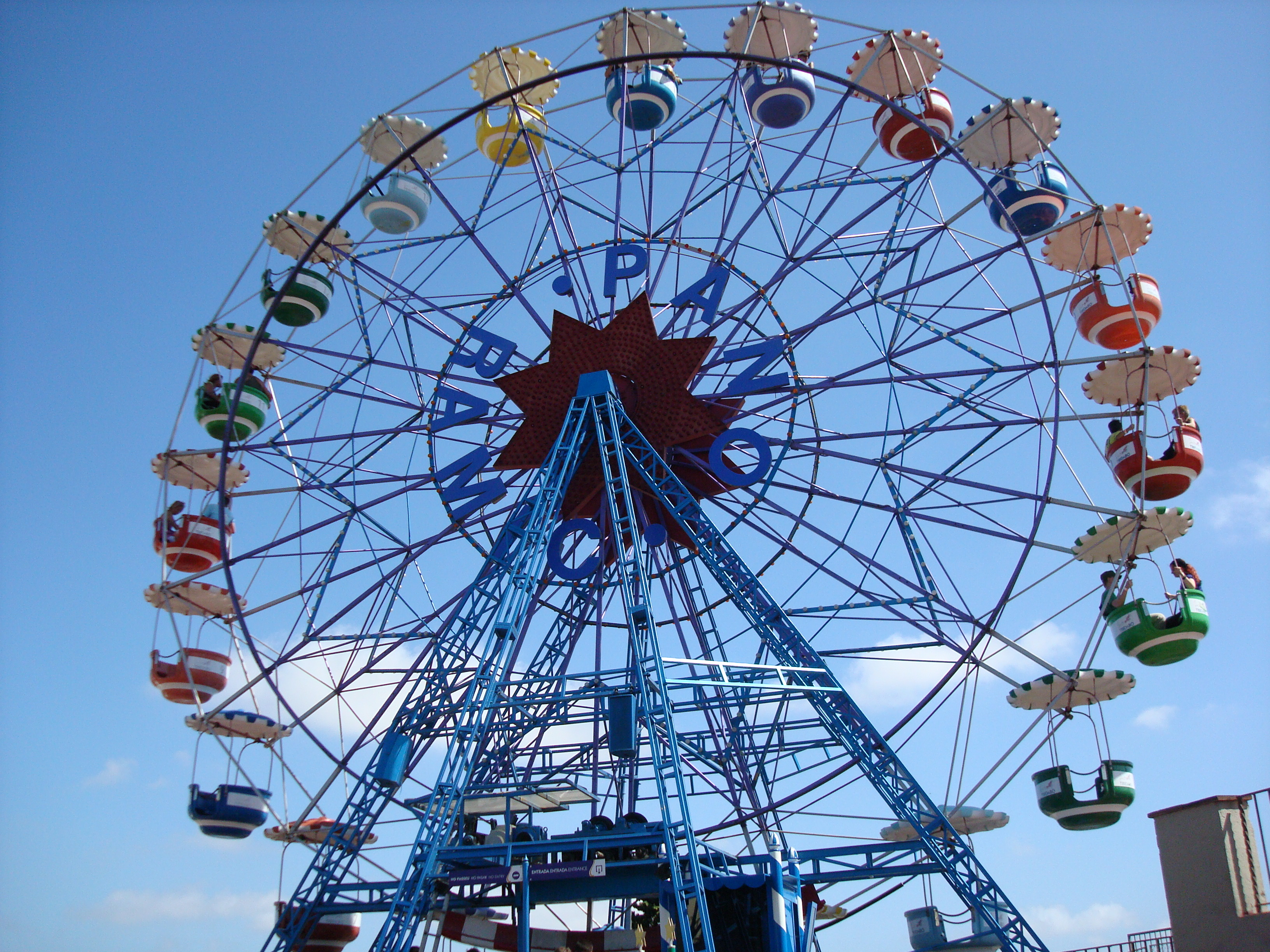 Atracció Panoràmic del Parc d'Atraccions del Tibidabo